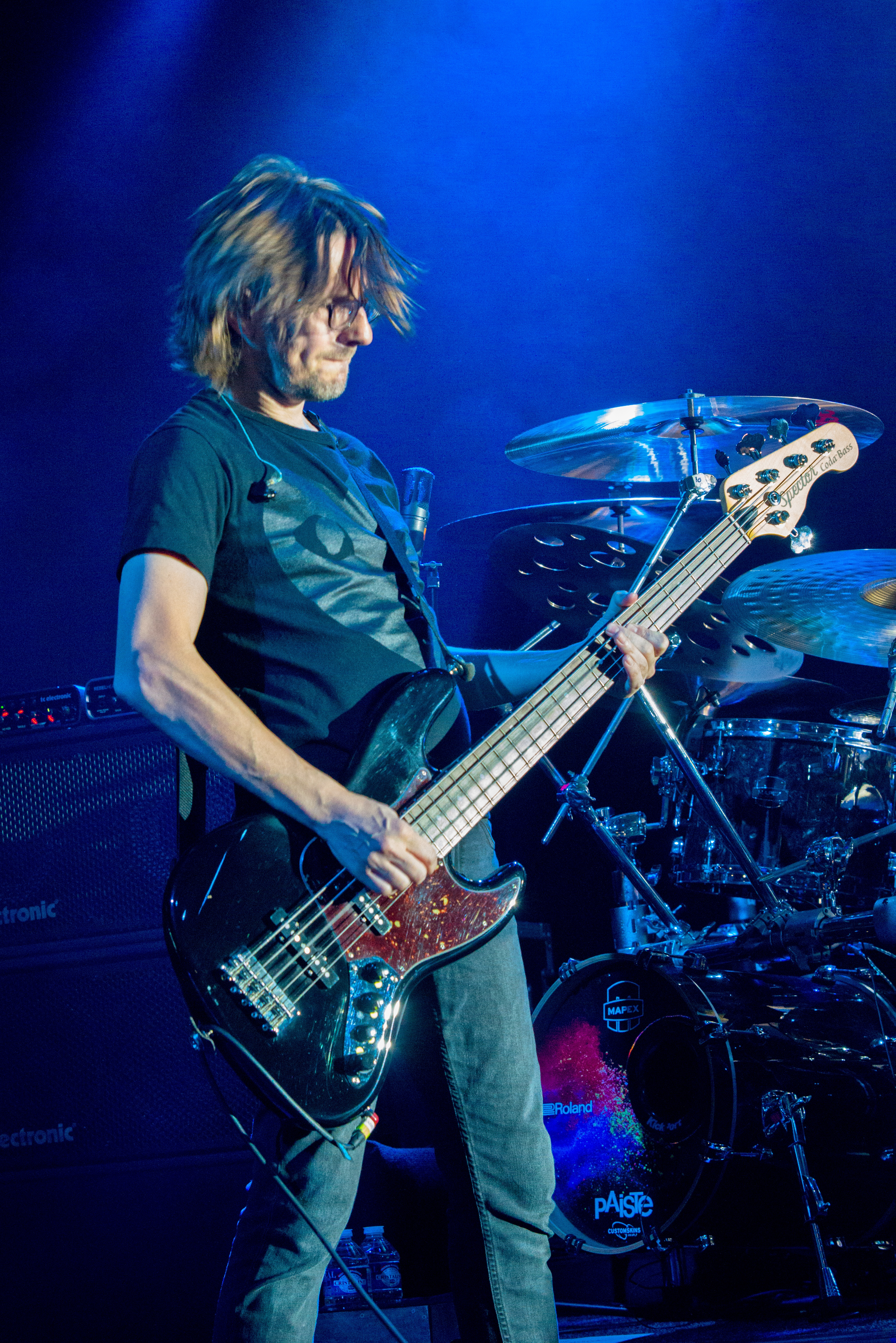 Bilder vom Zelt Musik Festival 2018 in Freiburg im Breisgau Das Eröffnungskonzert mit Steven Wilson